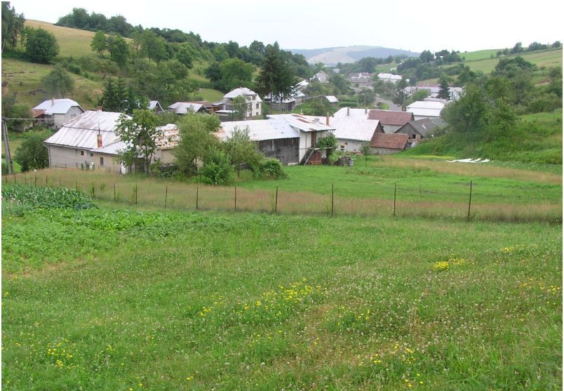 Celkový pohľad